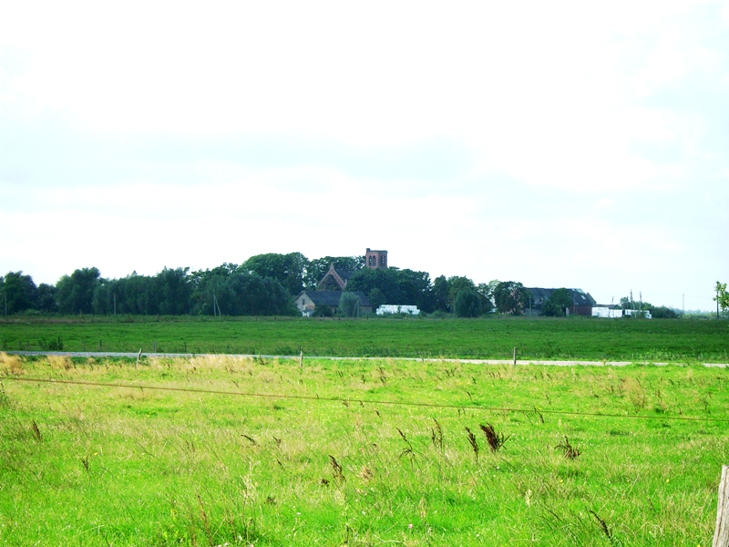 Plaškių panorama